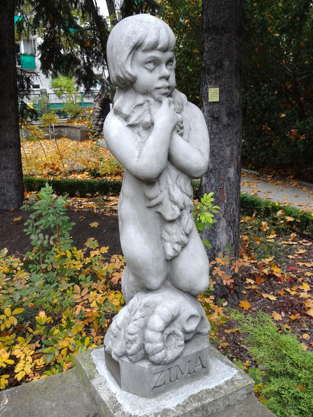 Ogród Botaniczny - arboretum Uniwersytetu Kazimierza Wielkiego w Bydgoszczy przy pl. Weyssenhoffa - figura "zima"